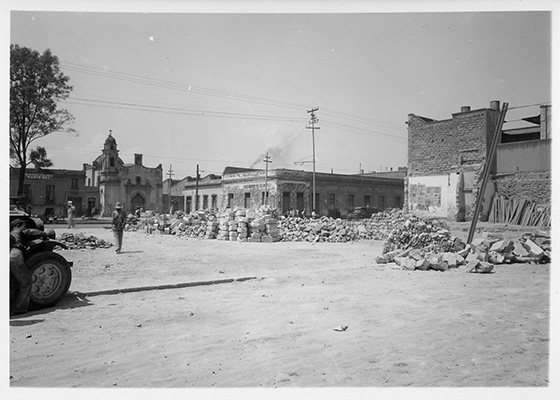 Fotografía antigua de la Ciudad de México resguardadas por el Museo Archivo de la Fotografía (MAF) de la Ciudad de México.